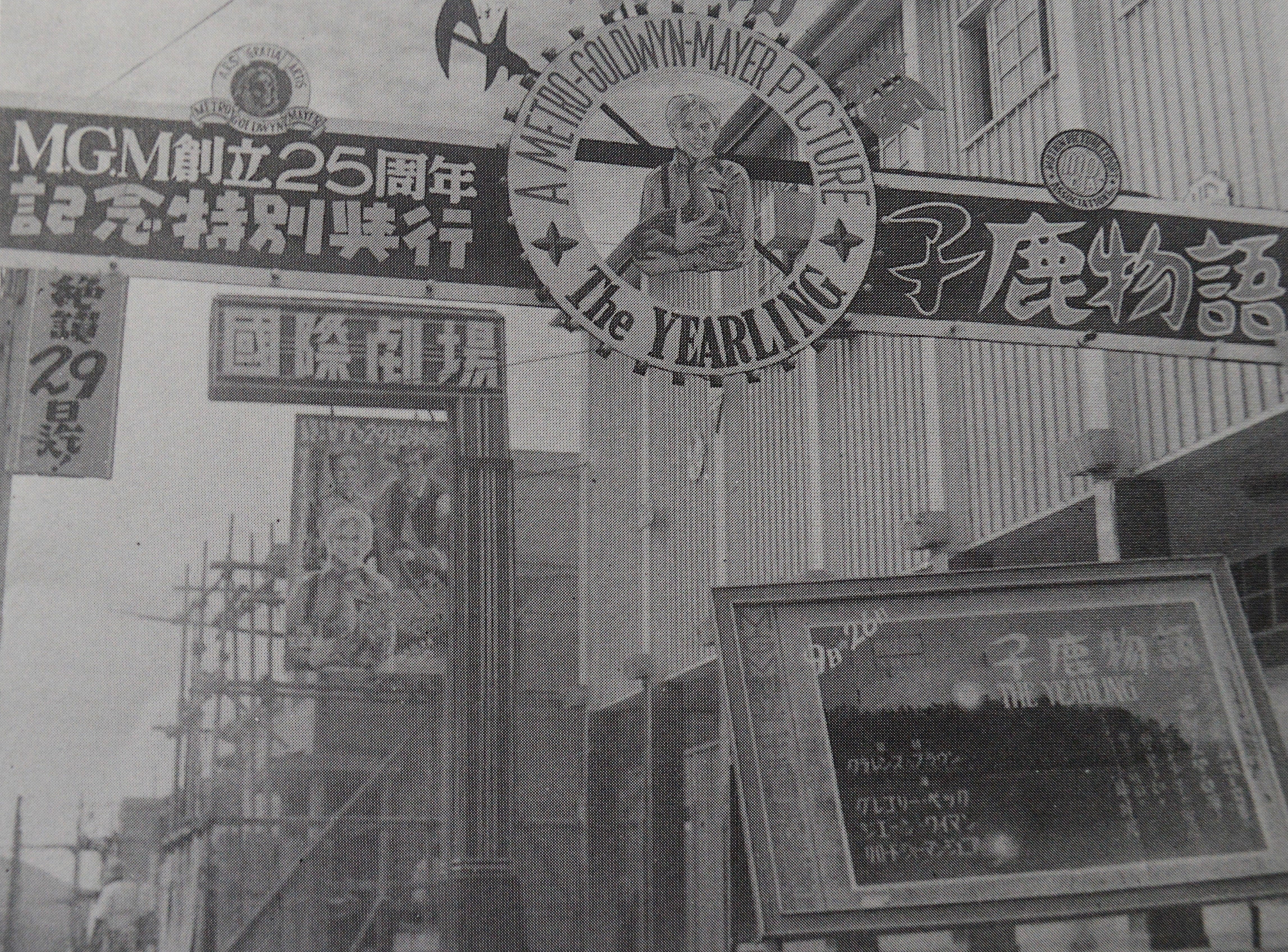 静岡市七間町の国際劇場。